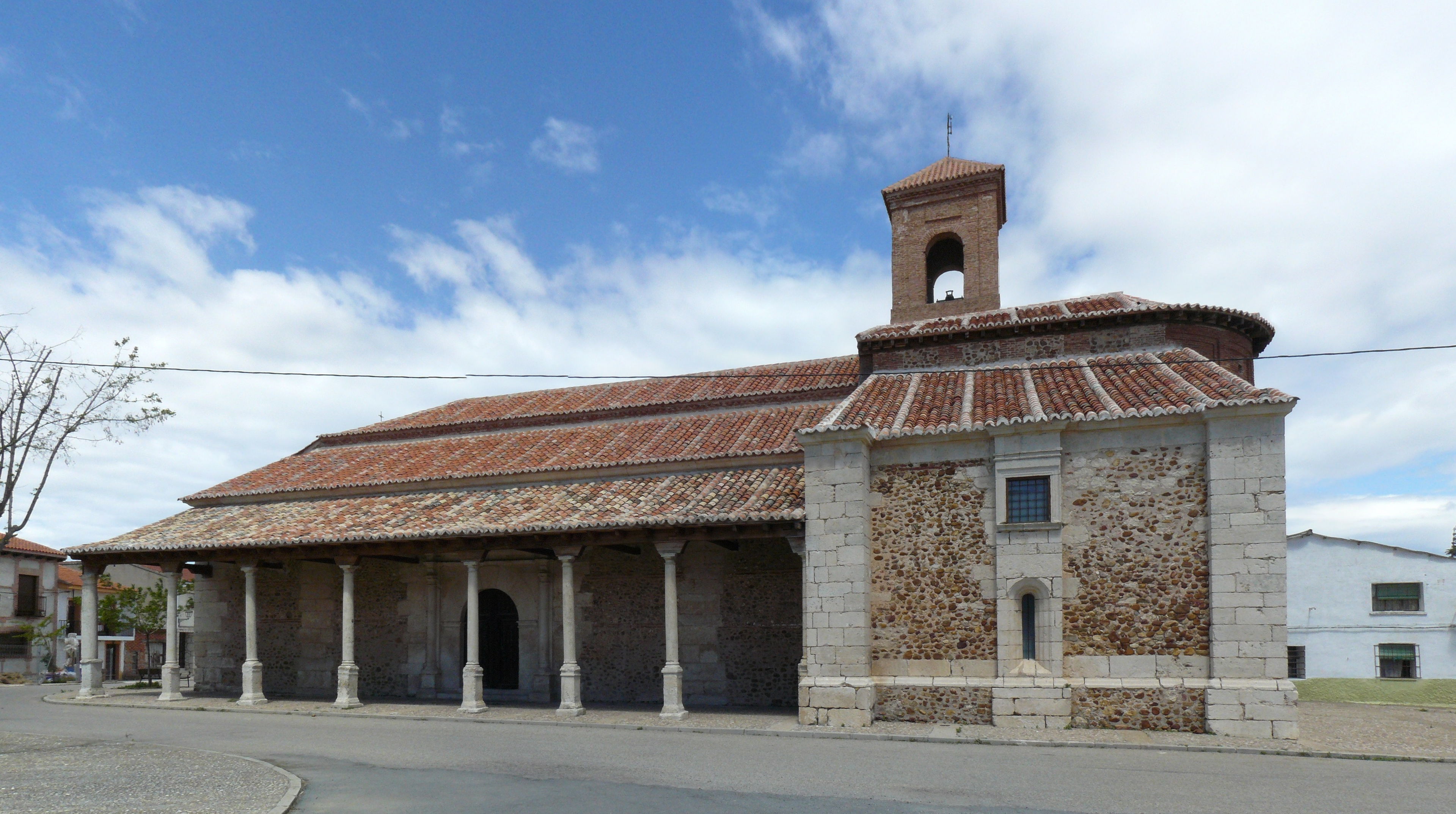 El Cubillo de Uceda, Iglesia de la Asunción de NUstra Señora, Cubillo de Uceda (Gudalajara).